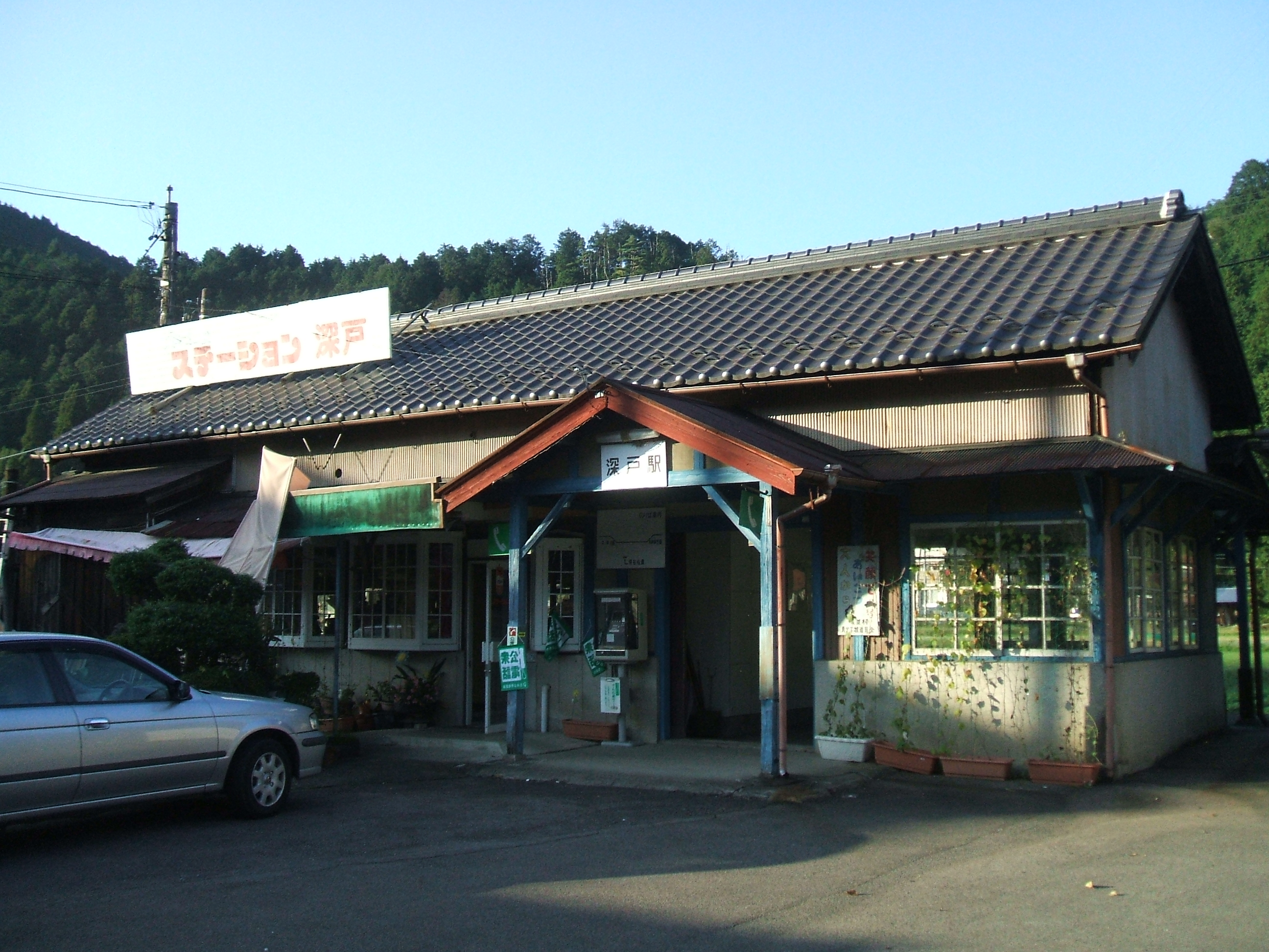 駅舎。